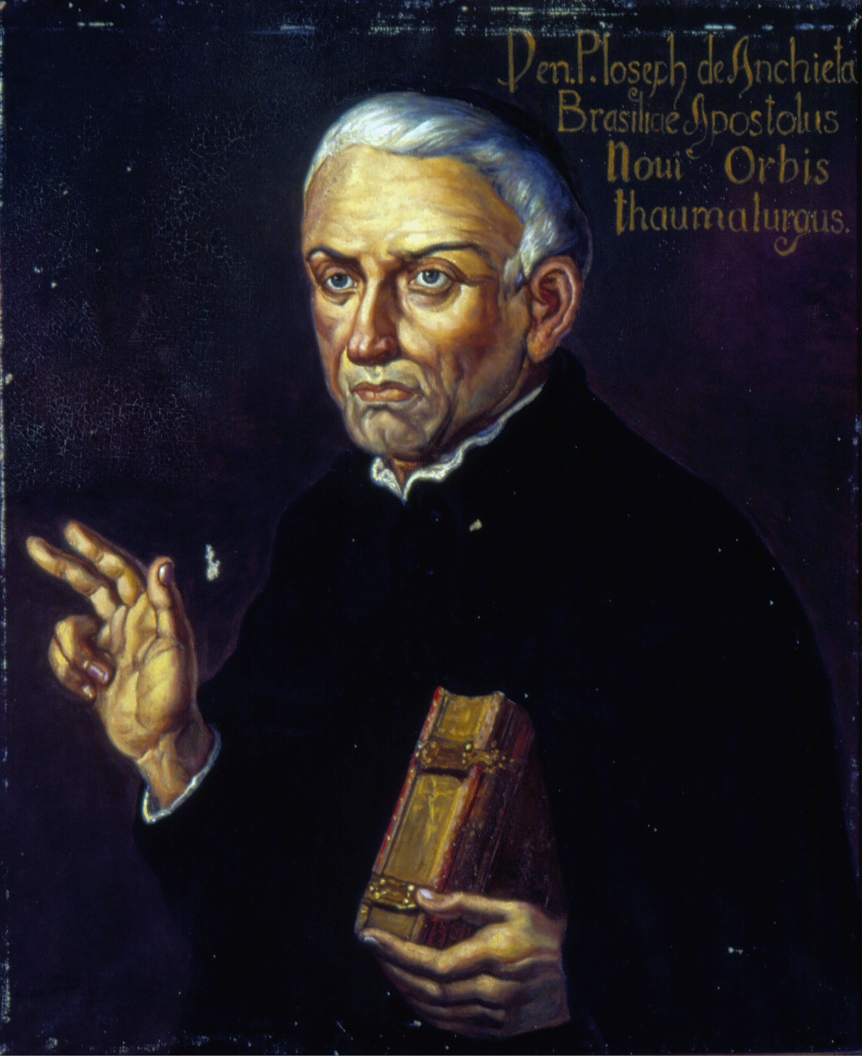 Obra que integra o acervo do Museu Paulista da USP. Coleção Fundo Museu Paulista - FMP